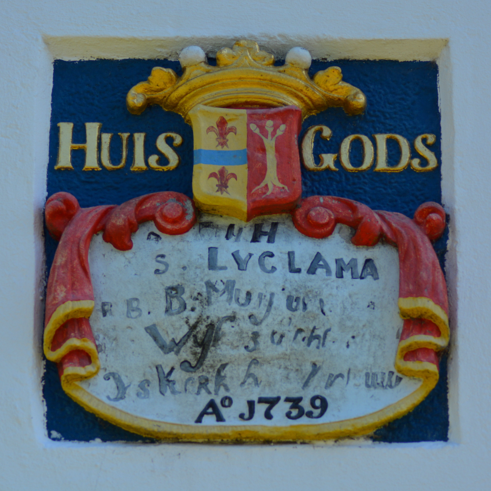 Gevelsteen boven de ingang van de kerk. Het wapen werd in 1797 door patriotten afgekapt.